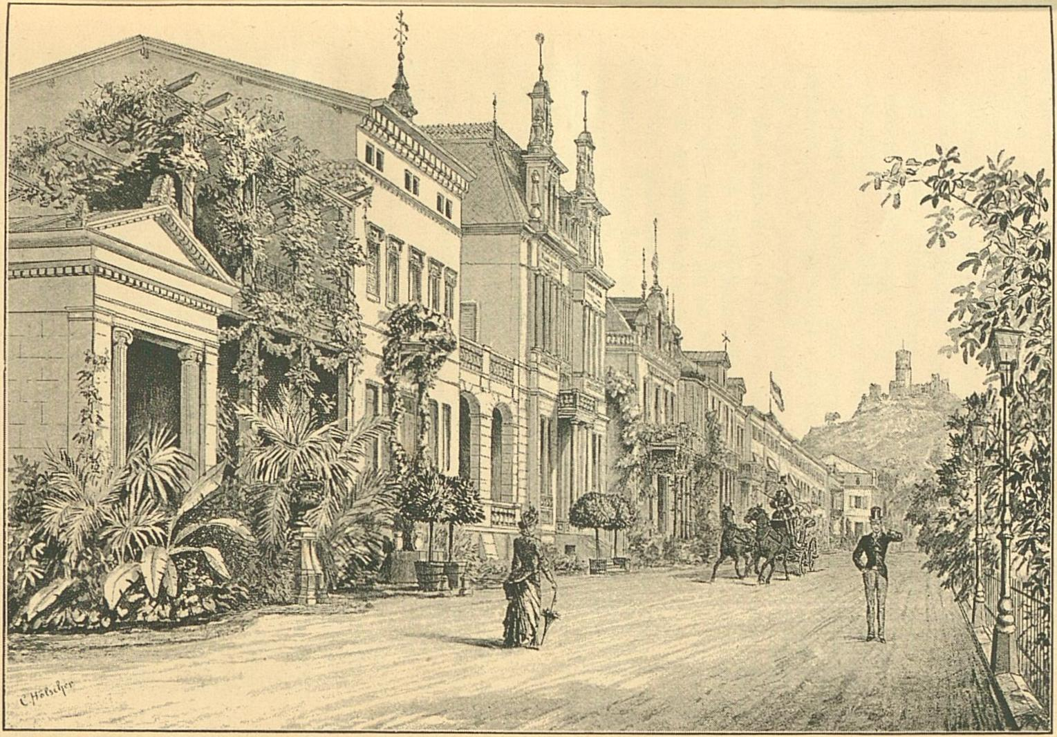 Churfürstenstraße (heute Kurfürstenallee), Godesberg. Zeichnung von Constantin Hölscher.